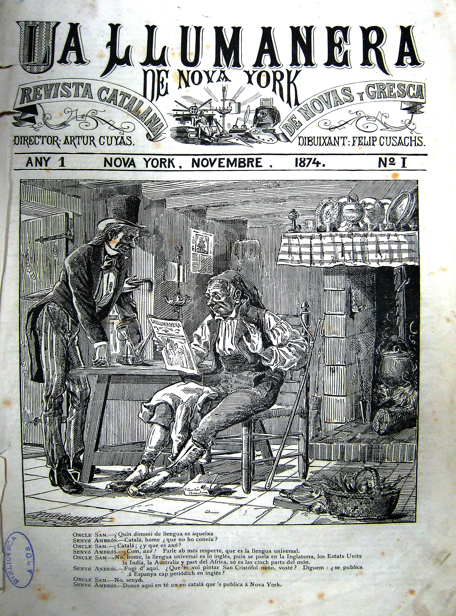 Portada del número 1 de "La Llumanera de Nova York", única revista en català editada als Estats Units.